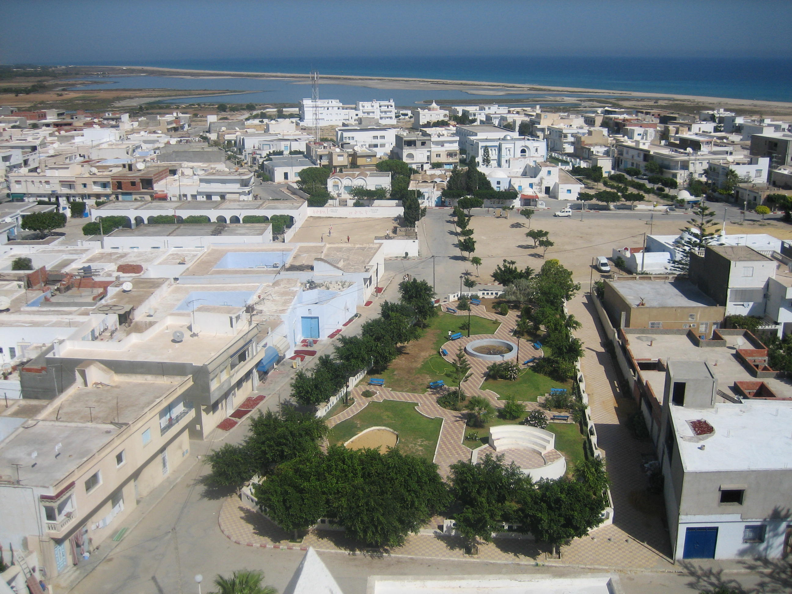 Une vue de dessus sur la ville de Maamoura